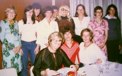 1. Internationale Deutsche Damenmeisterschaft 1977, September bis 7. Oktober 1977 in Bad Kissingen. Marta Litinskaja-Schul gewinnt vor Gisela Fischdick die Schachmeisterschaft. Unten auf dem Bild sind die Teilnehmerinnen aufgeführt. Vorn sitzend von links nach rechts: Elisabeta Polihroniade, Marta Litinskaja (Erste) und Turnierleiterin Margarete Grzeskowiak. Hinten stehend von links nach rechts: Gyulane Krizsan, Barbara Hund, Milka Ankerst, Hannelore Weichert, Anni Laakmann, Hanna Erensla, Gisela Fischdick, Thea Prill, Regine Fendel